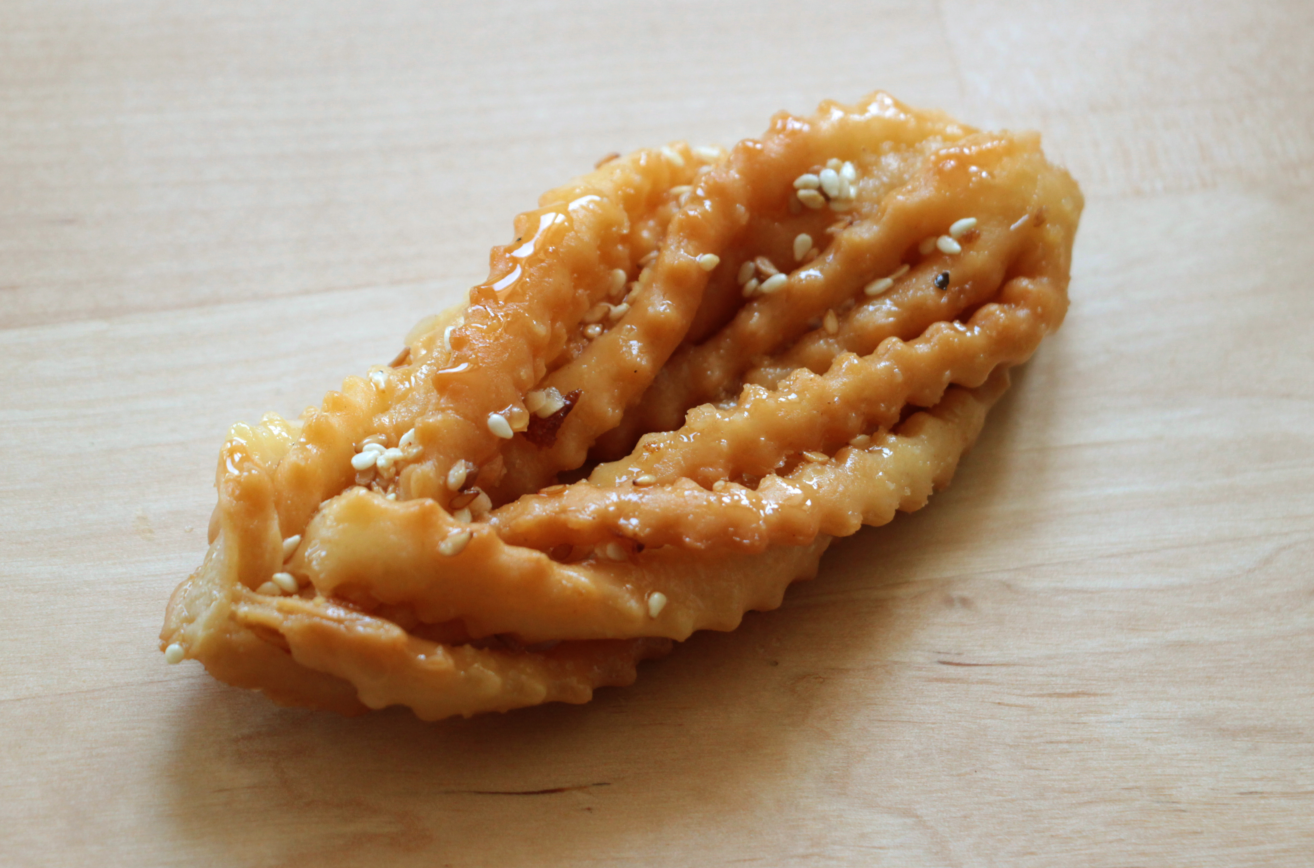 Griouech algérienne (pâtisserie) en forme de tresse.